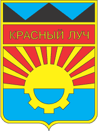 Герб міста Красний Луч радянських часів